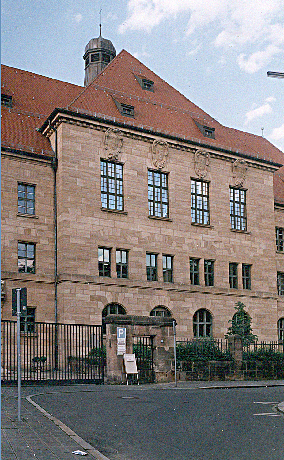 Здание суда присяжных с Залом 600.Нюрнберг